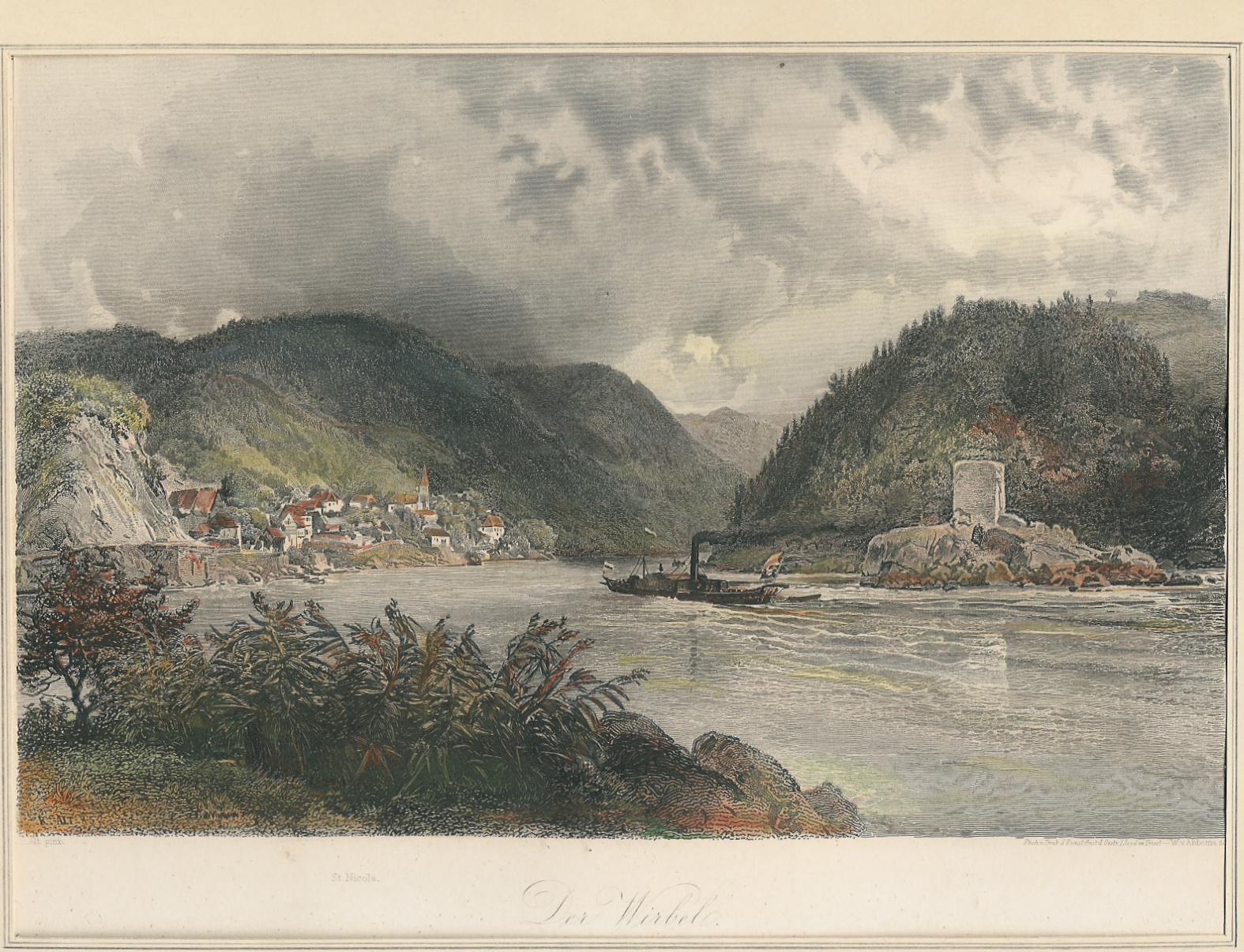 Der so genannte Wirbel in der Donau mit dem Hausstein, Niederösterreich/Oberösterreich Original Aquarell 1844 Rudolf von Alt koloriert von unbekannt